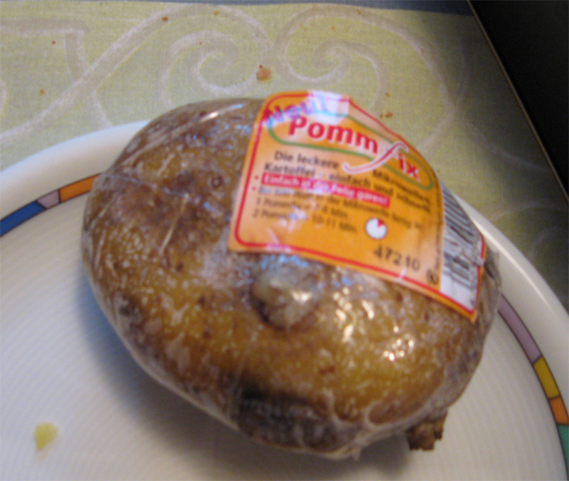 Mikrowellenkartoffel.jpg